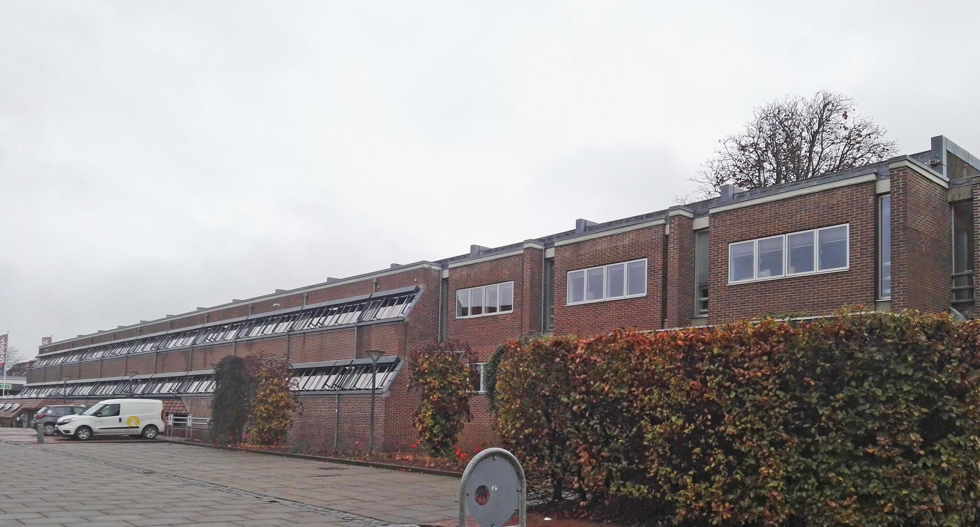 Odder Rådhus fra vest